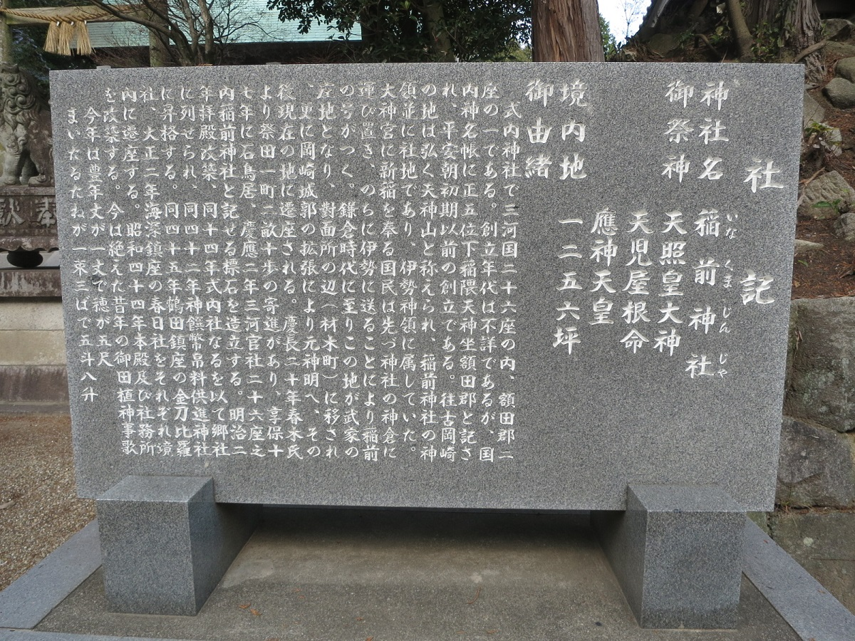 稲前神社の石碑